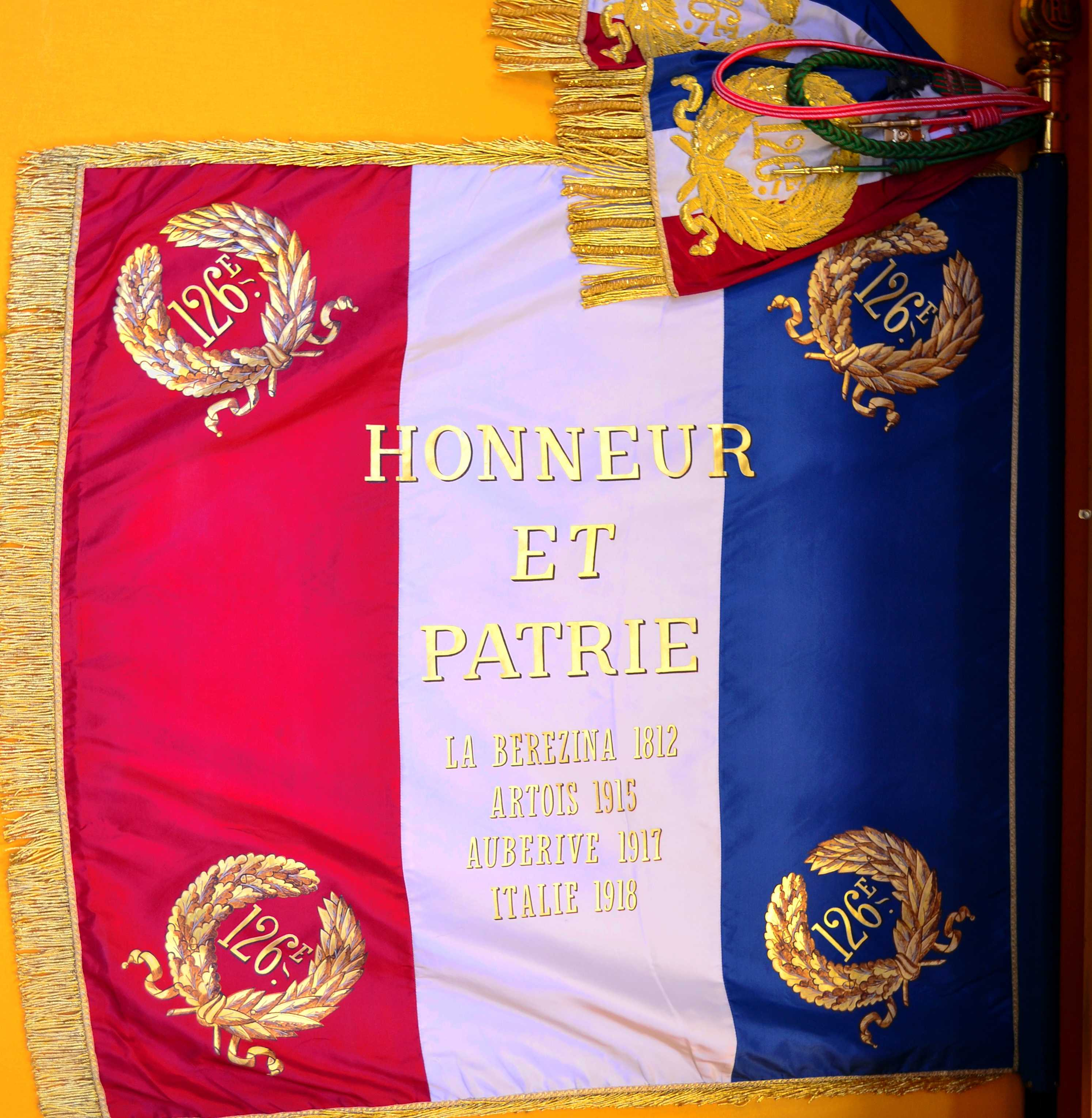 Emblème actuellement utilisé au régiment